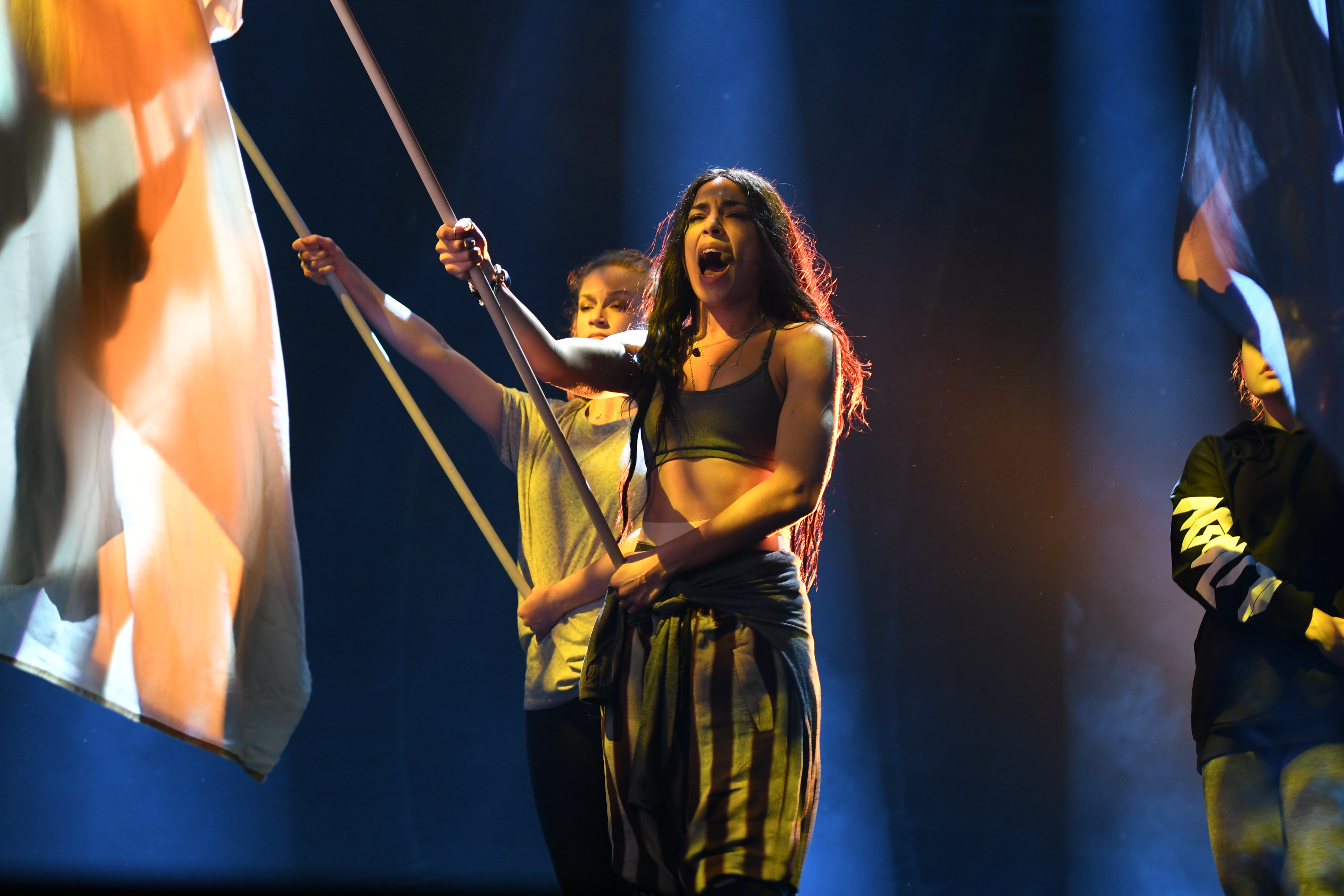 Loreen på torsdagsrepetitionerna inför andra chansen.